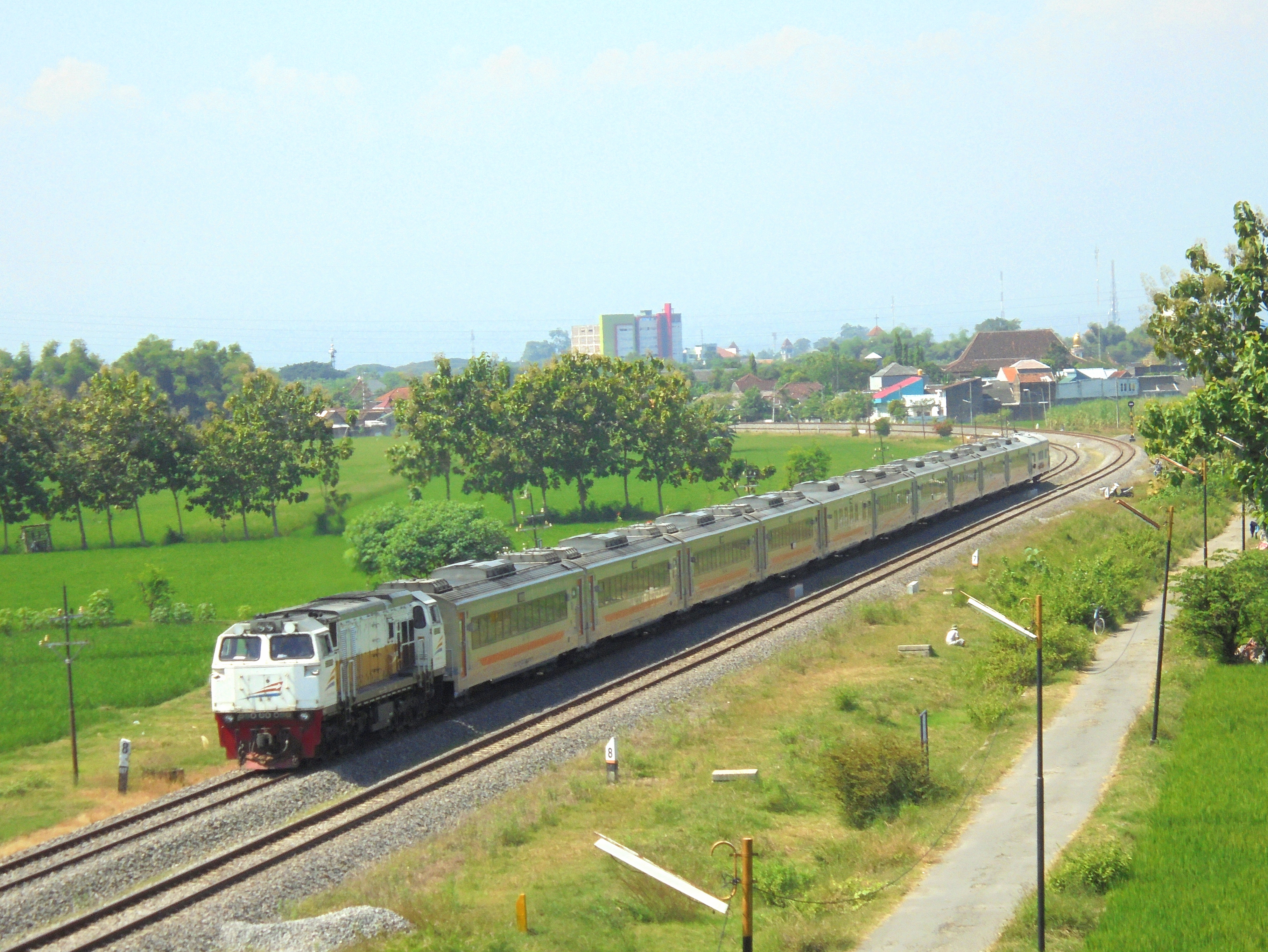 Kereta api Sancaka saat melintas di persawahan Winongo, Manguharjo, Madiun